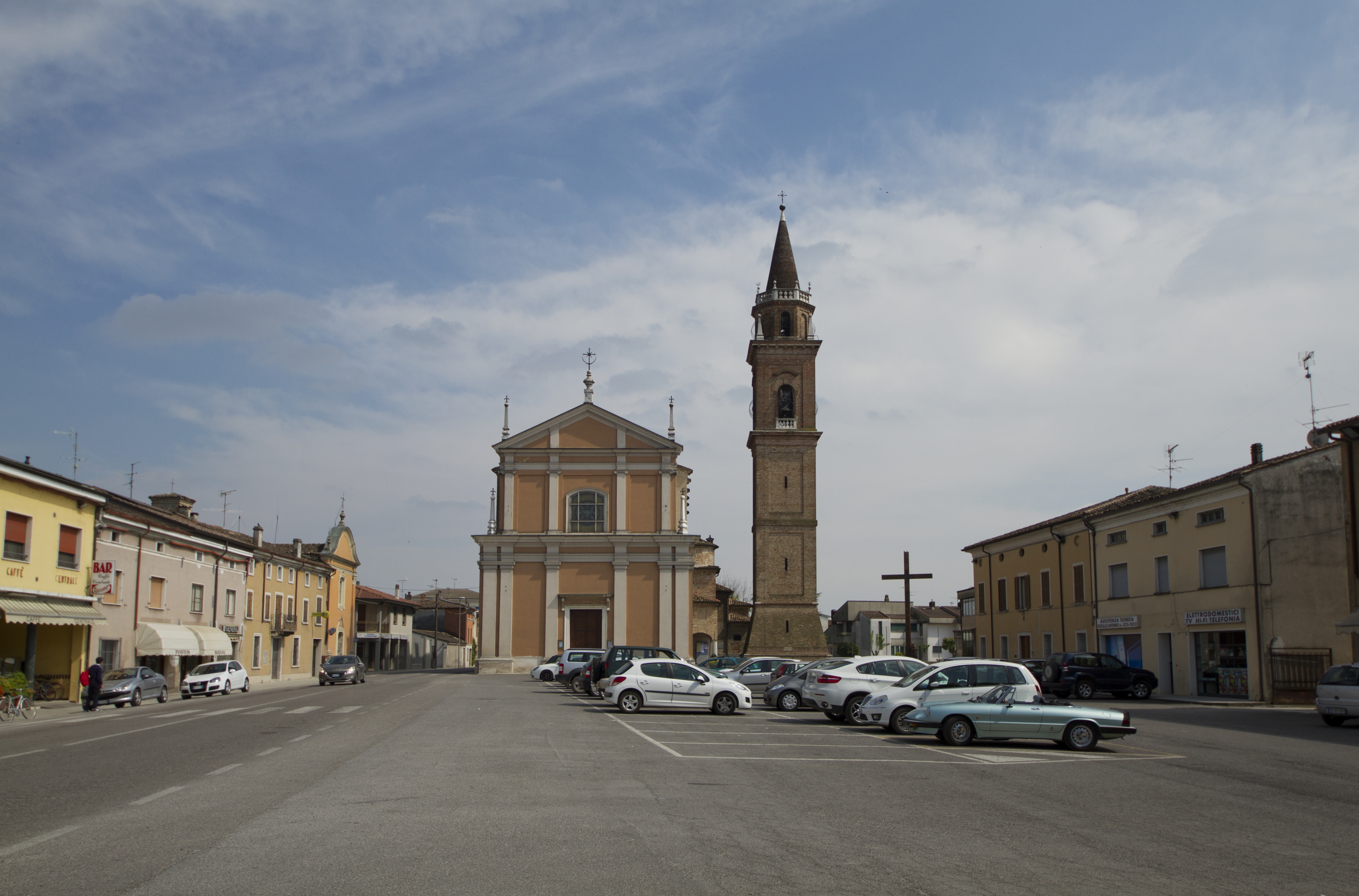 46040 Casaloldo MN, Italy